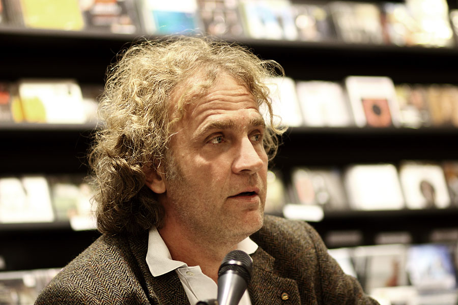 Alex Capus, Krefeld Thalia Buchhandlung, 20.November 2013. Lesung aus "Der Fälscher, die Spionin und der Bombenbauerl"